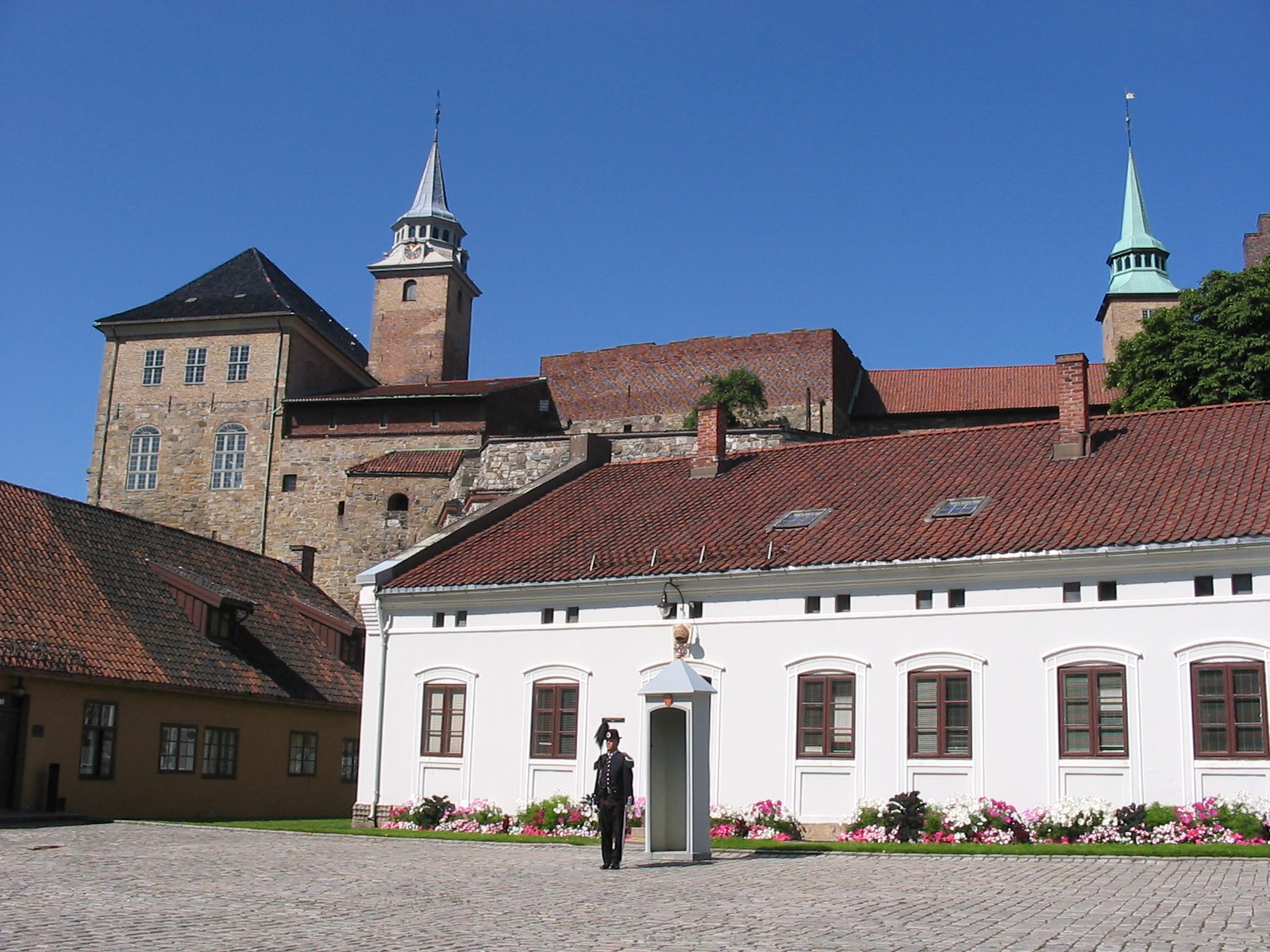 Château Akersuhs - Oslo (Norvège). Je suis l'auteur du cliché pris en juillet 2004